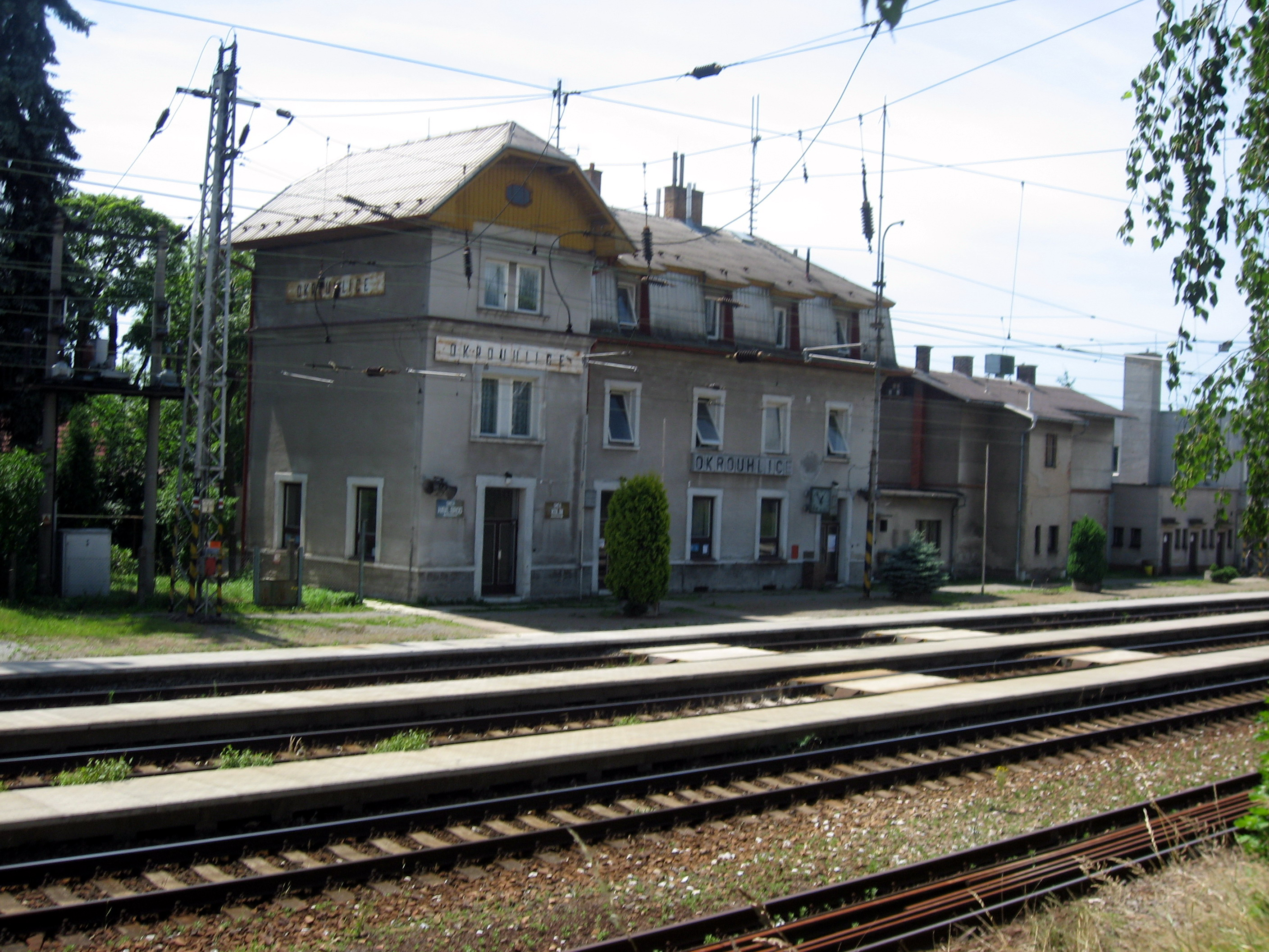 Okrouhlice, nádraží